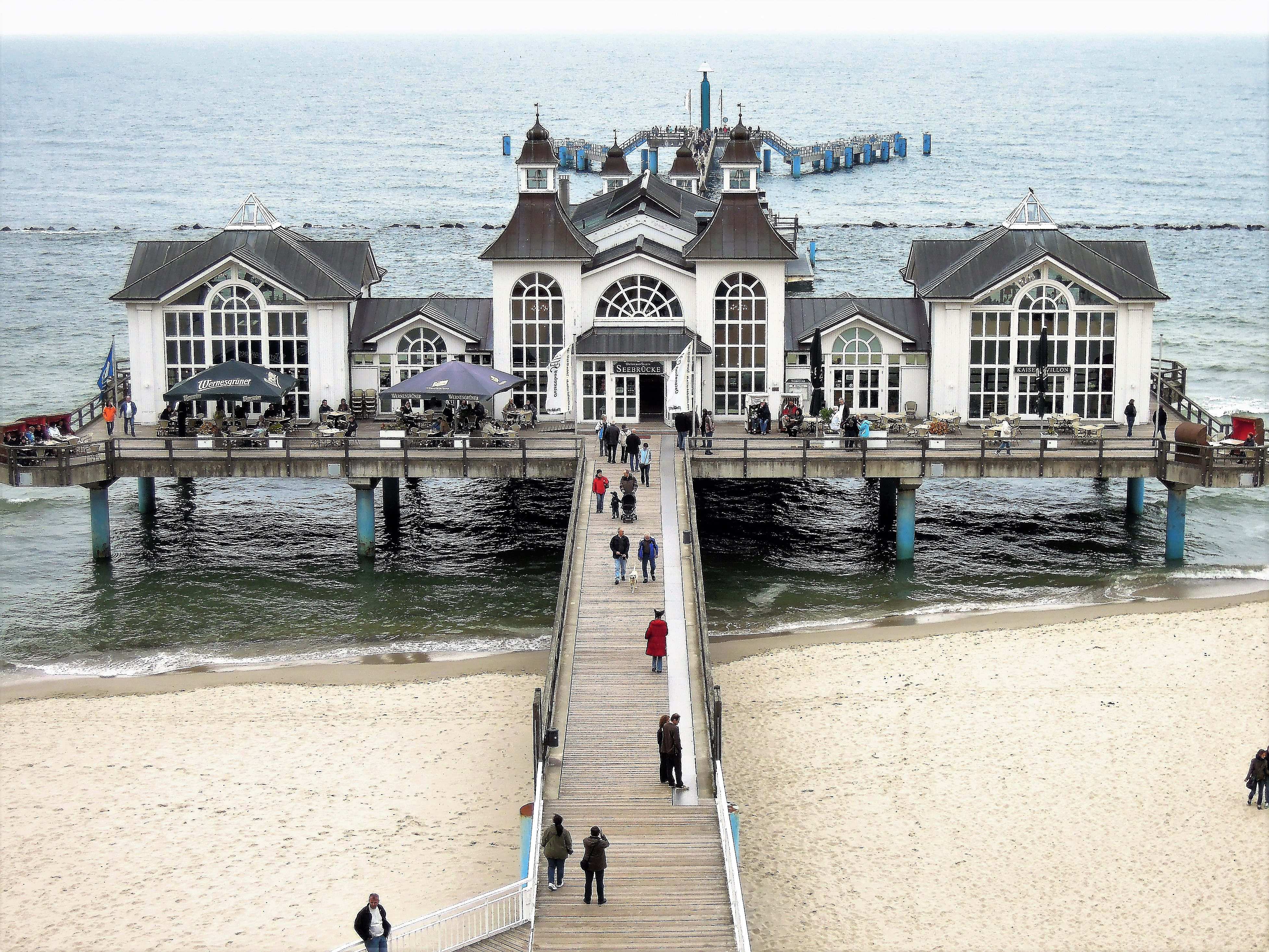 Die Seebrücke von Sellin auf der Insel Rügen.